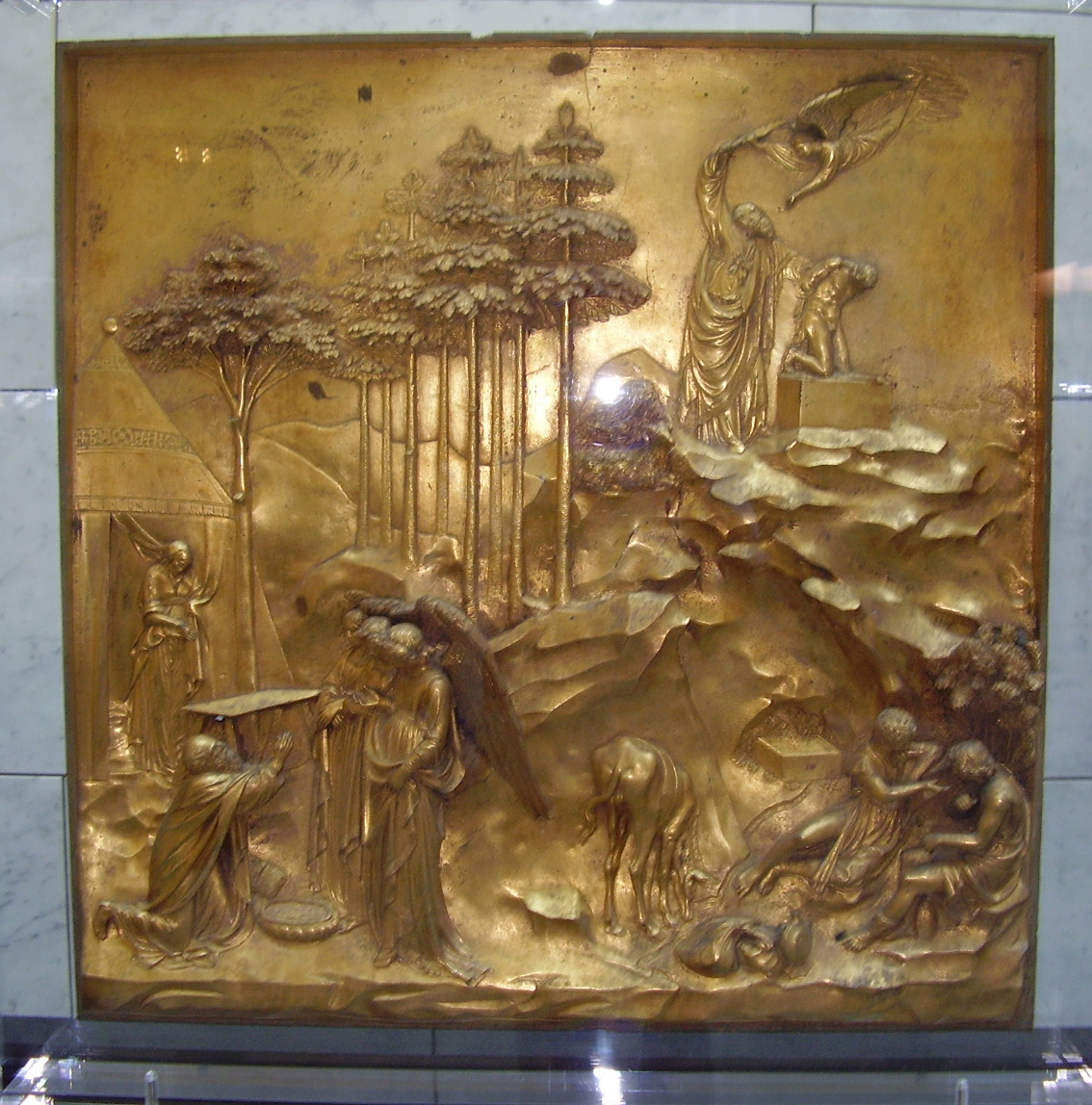 Formella battistero 4 Abramo